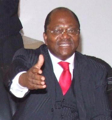 Son Excellence René Isekemanga Nkeka